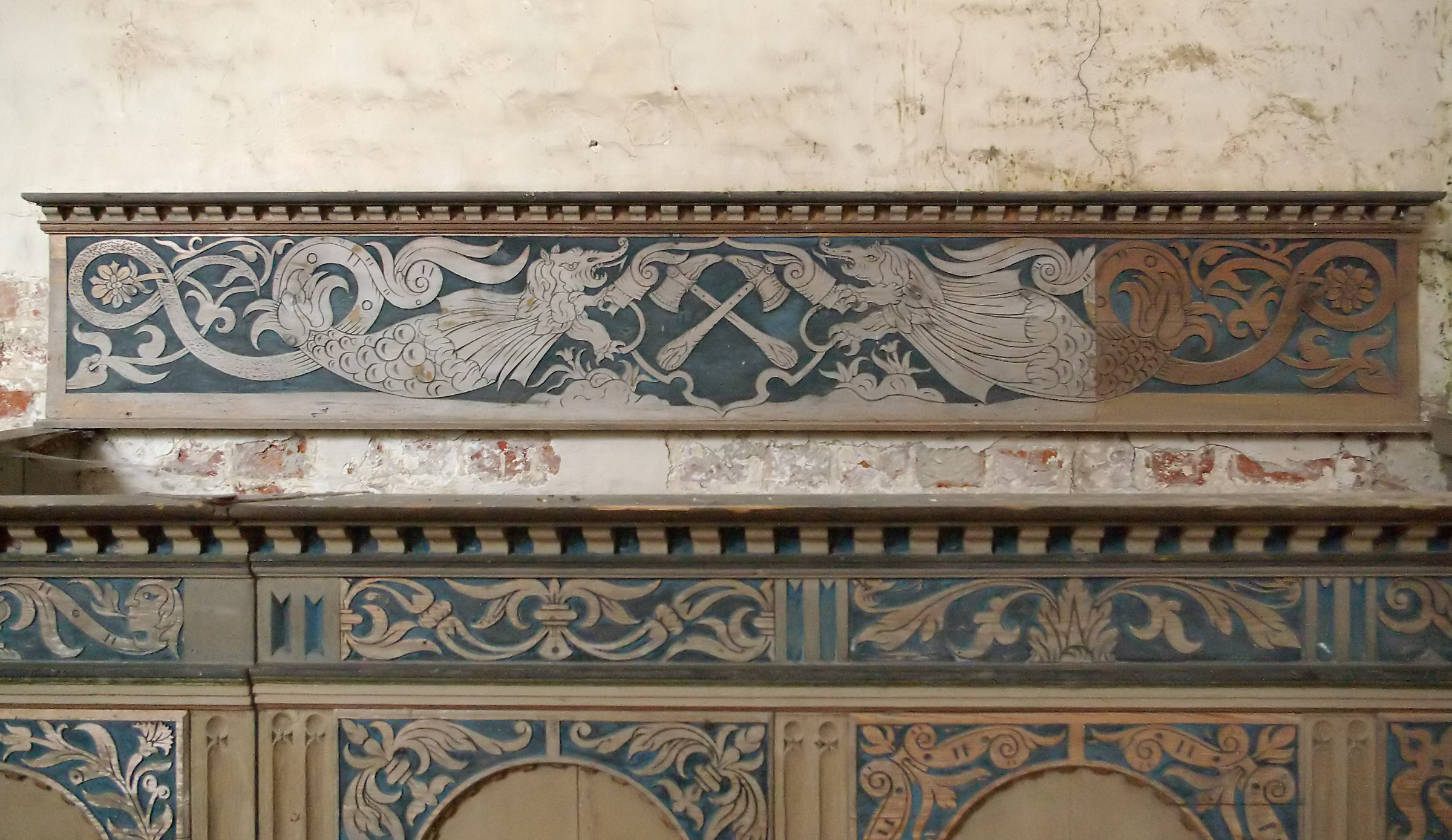 Fries über der Presbyter-Bank (?) in der St. Marienkirche